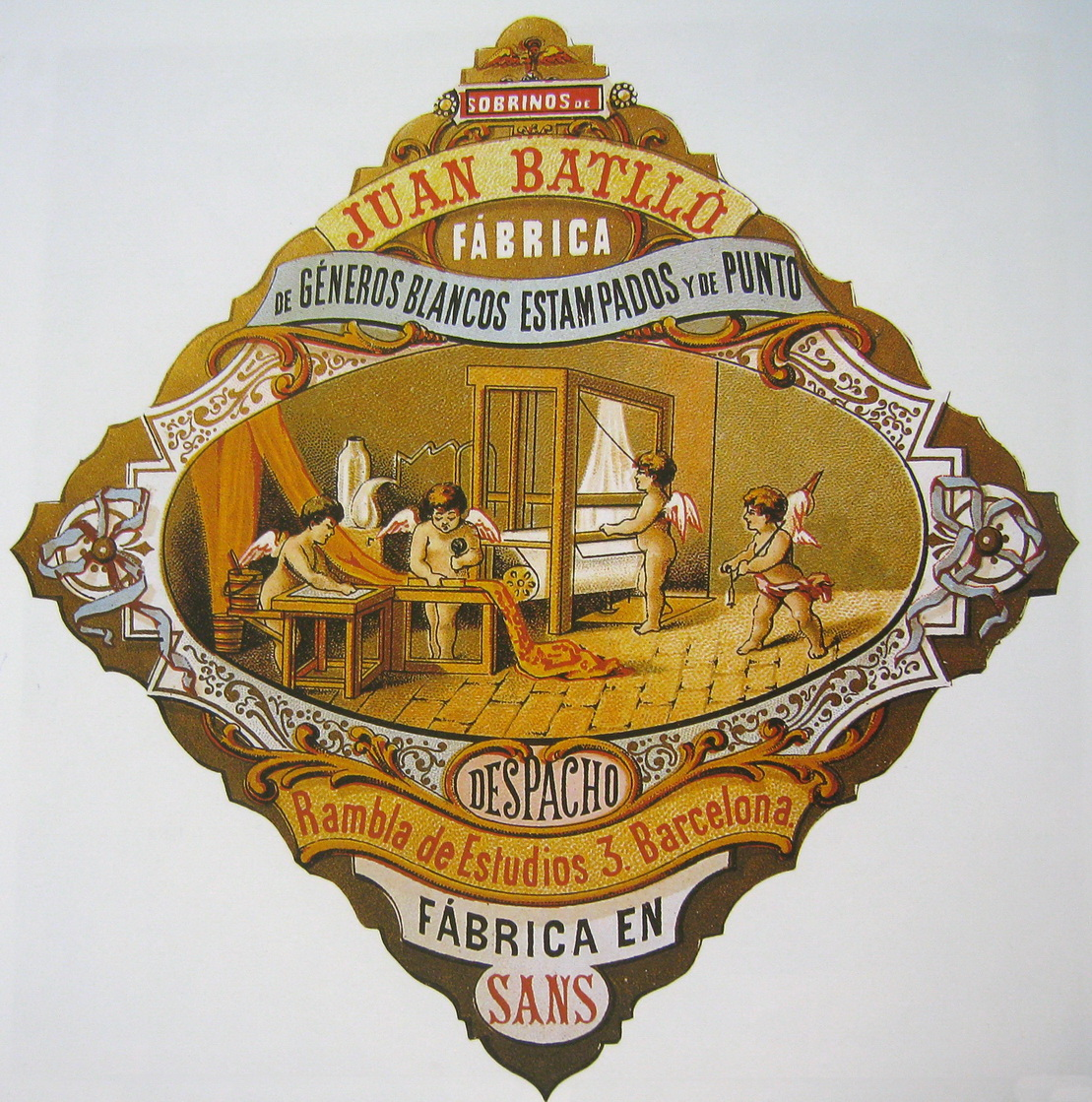 Etiqueta de la fàbrica "Joan Batlló" de 1888